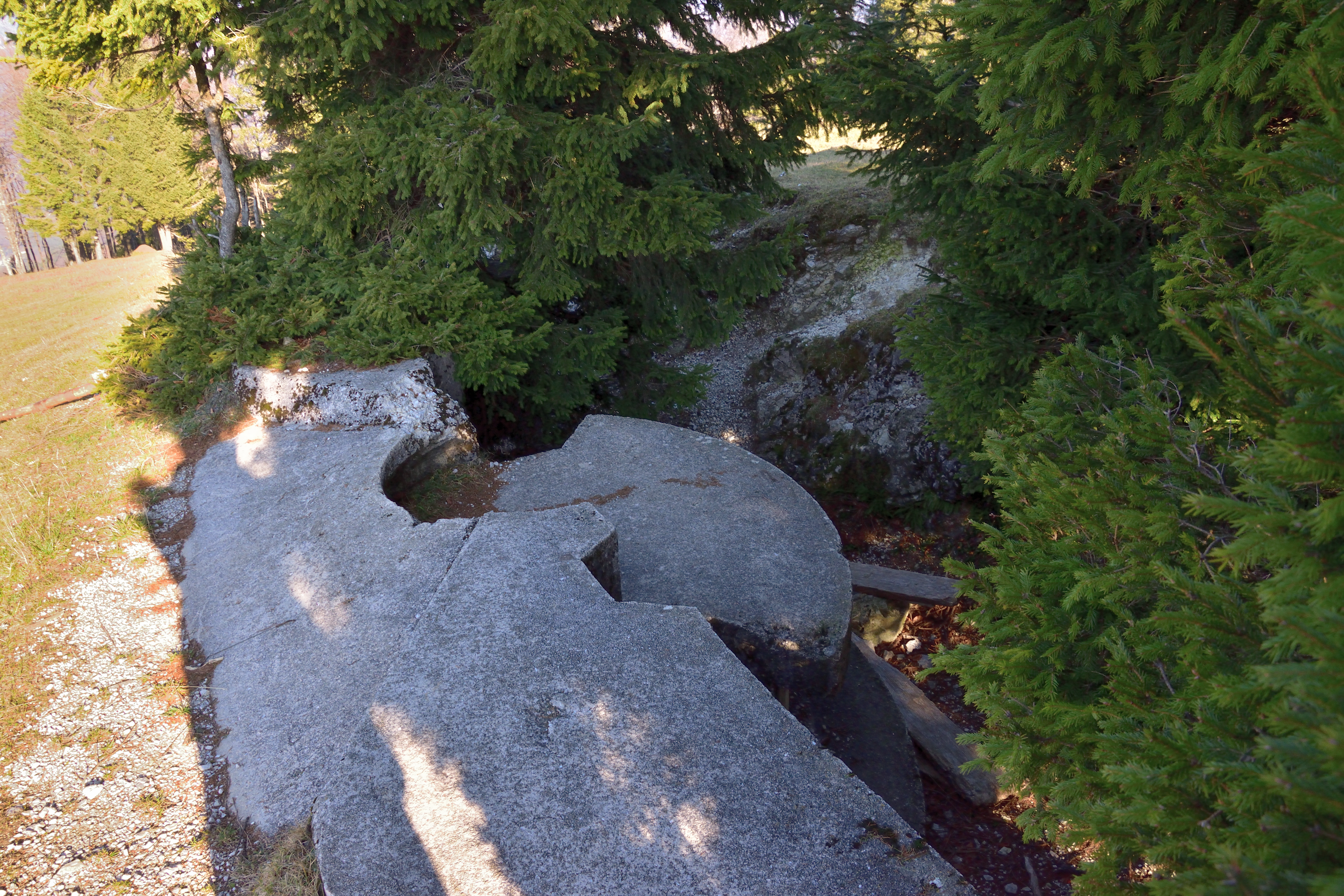 Mitralješko gnezdo pod vrhom Blegoša, stoji nasproti koče pod Blegošem. Zgrajen je bil med obema svetovnima vojnama za potrebe varovanja takratne rapalske meje.